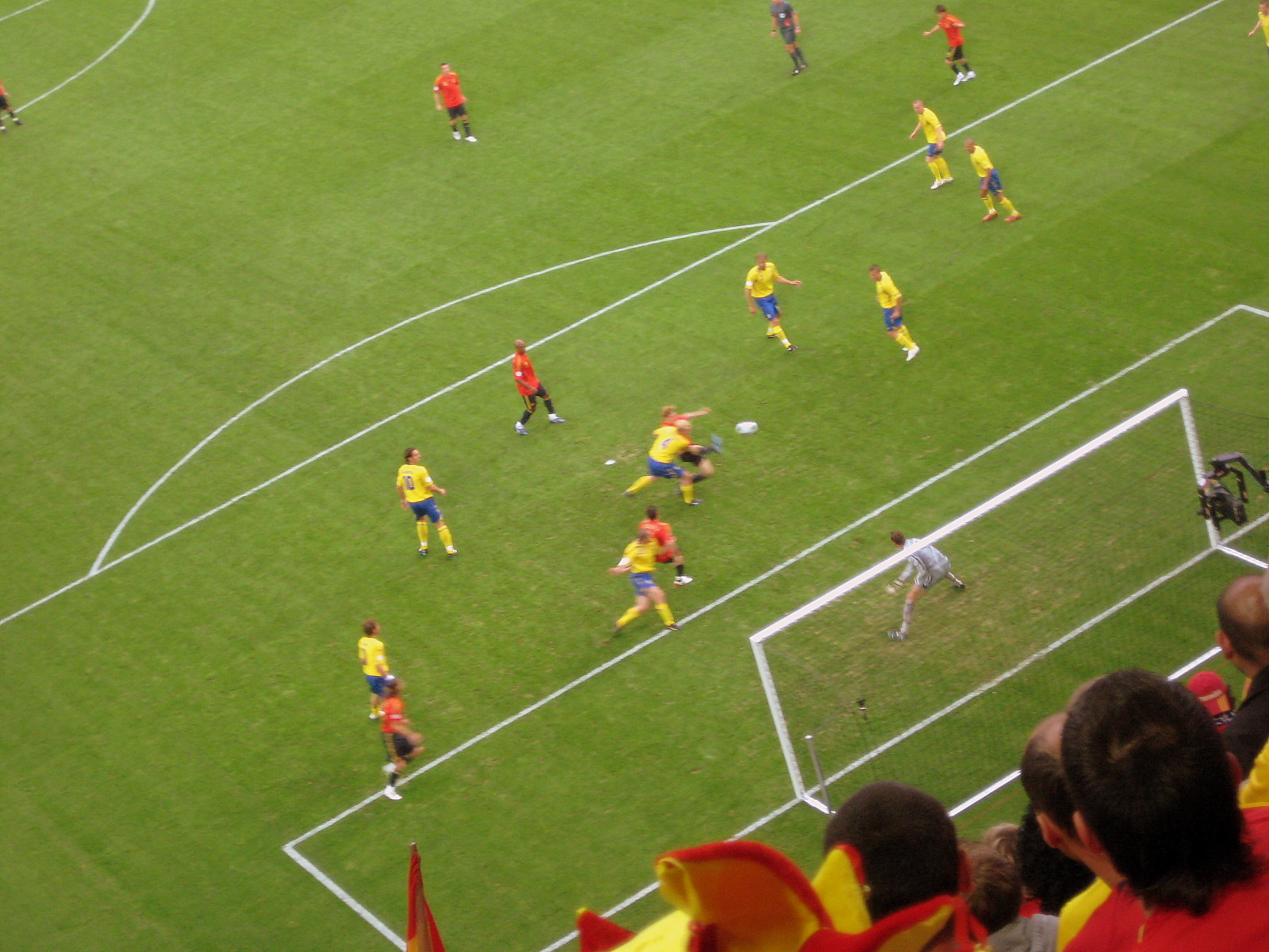 Spain vs Sweden, Euro 2008